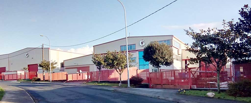 Vista de Gabadi en Río do Pozo, Narón.